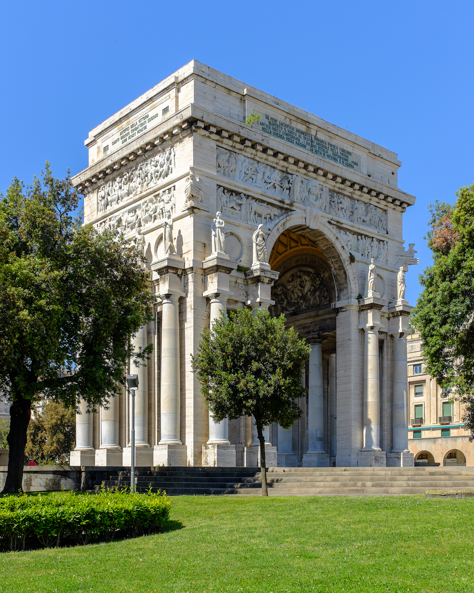 Arco di Trionfo This is a photo of a monument which is part of cultural heritage of Italy.